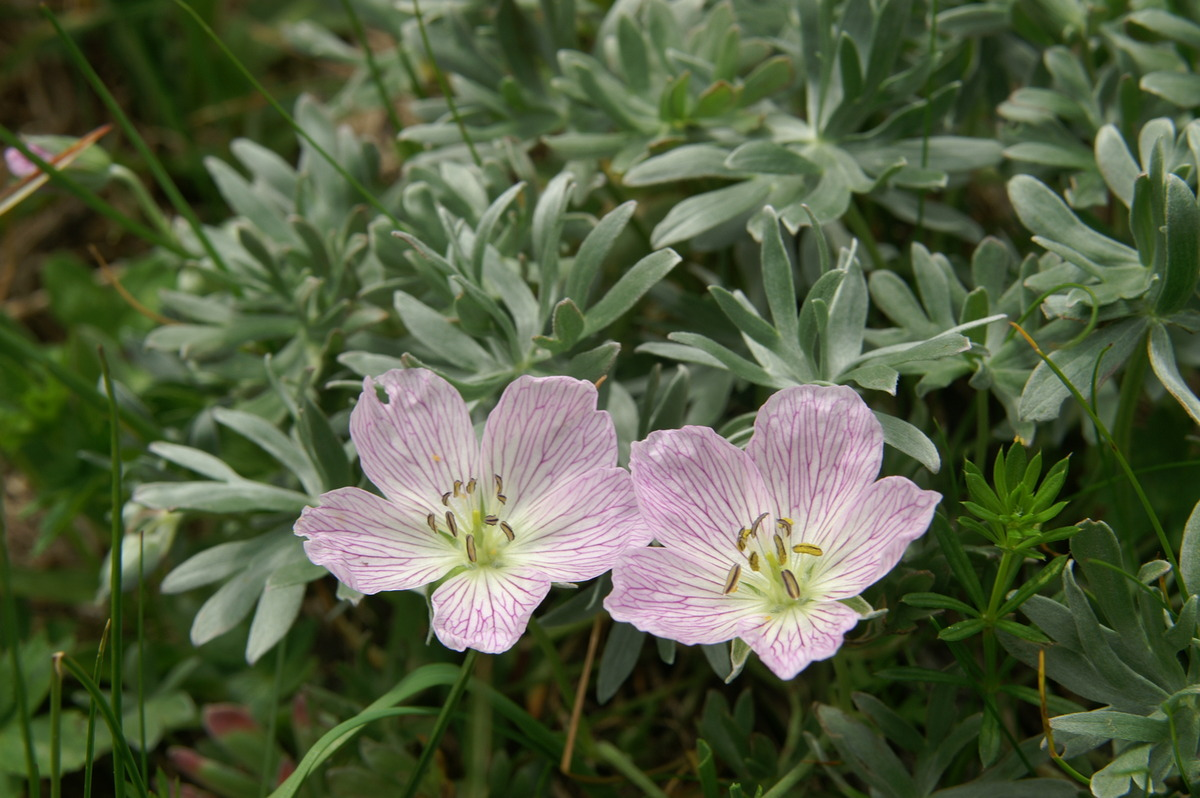 Srebrna krvomočnica na Črni prsti.